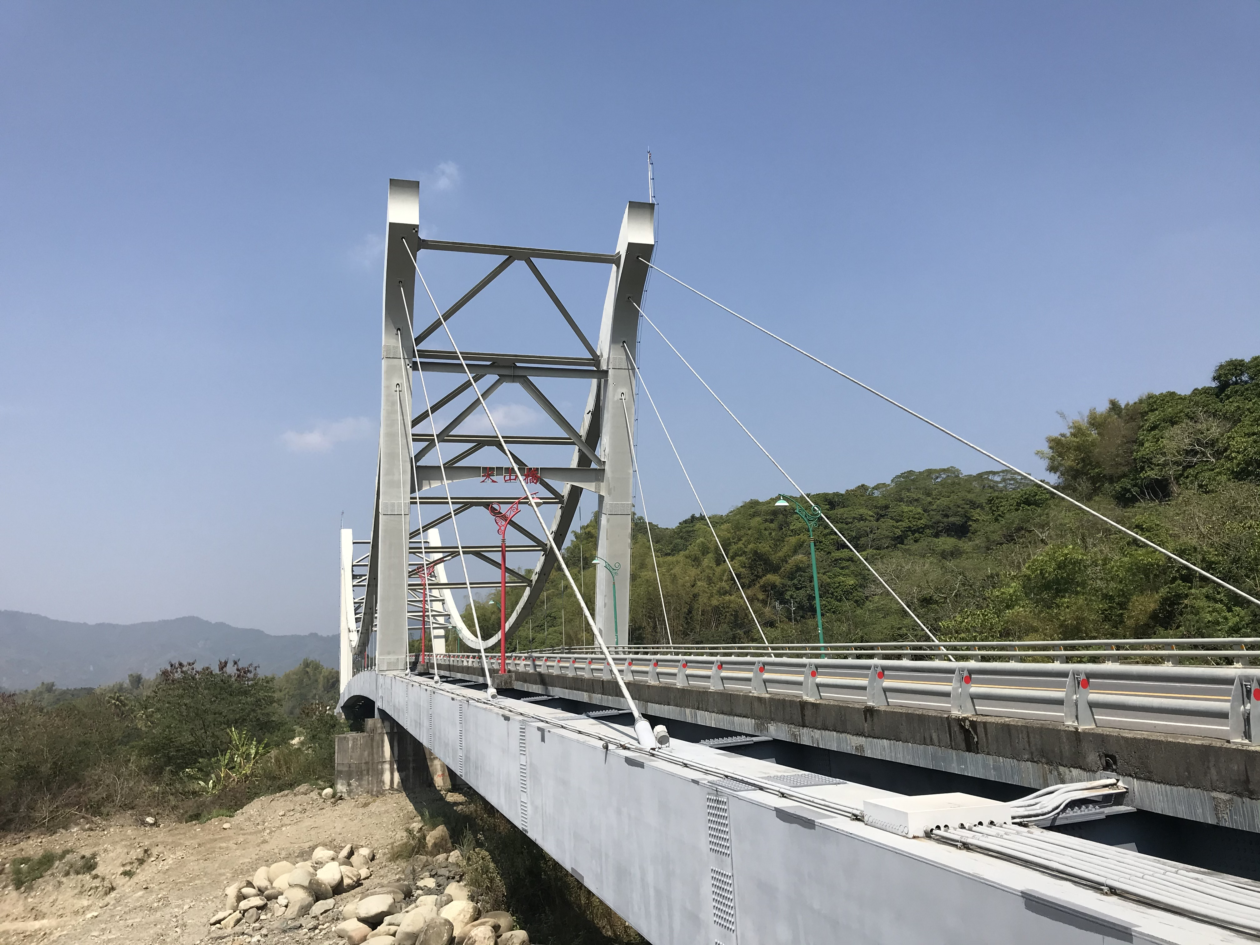 中文（台灣）: 臺灣高雄市杉林區火山橋